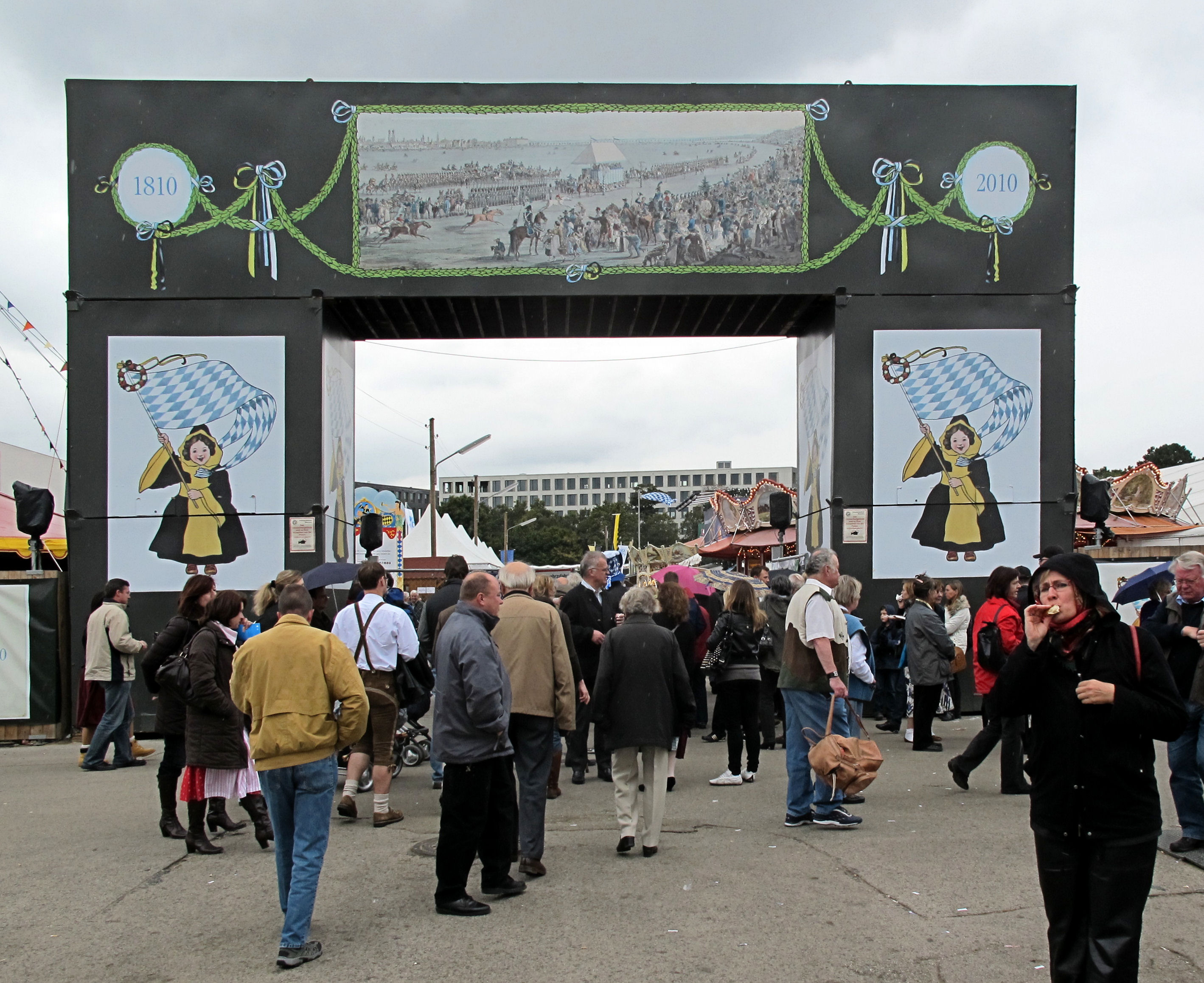 Eingang zum "Historischen Oktoberfest" im Rahmen der 200jährigen Jubiläumswiesen im Jahre 2010